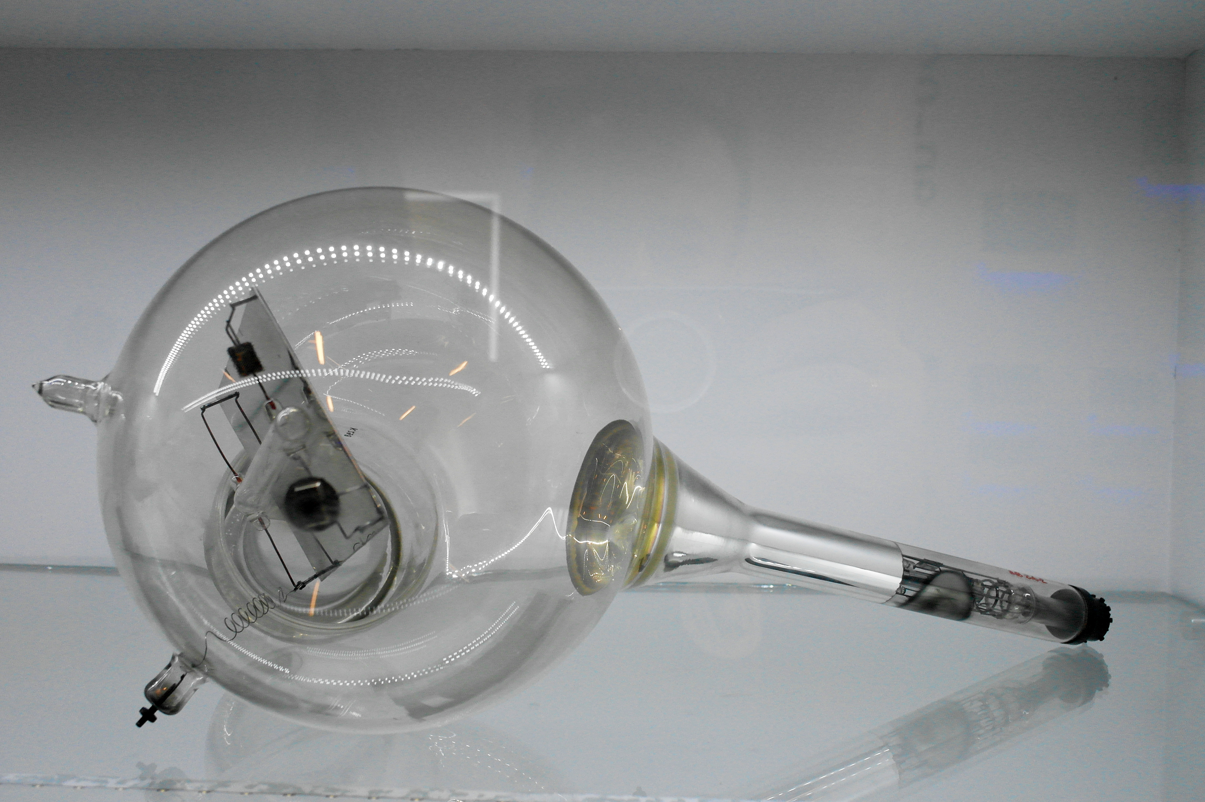 Iconoscope video camera tube in National Czech Technical Museum, Prague.